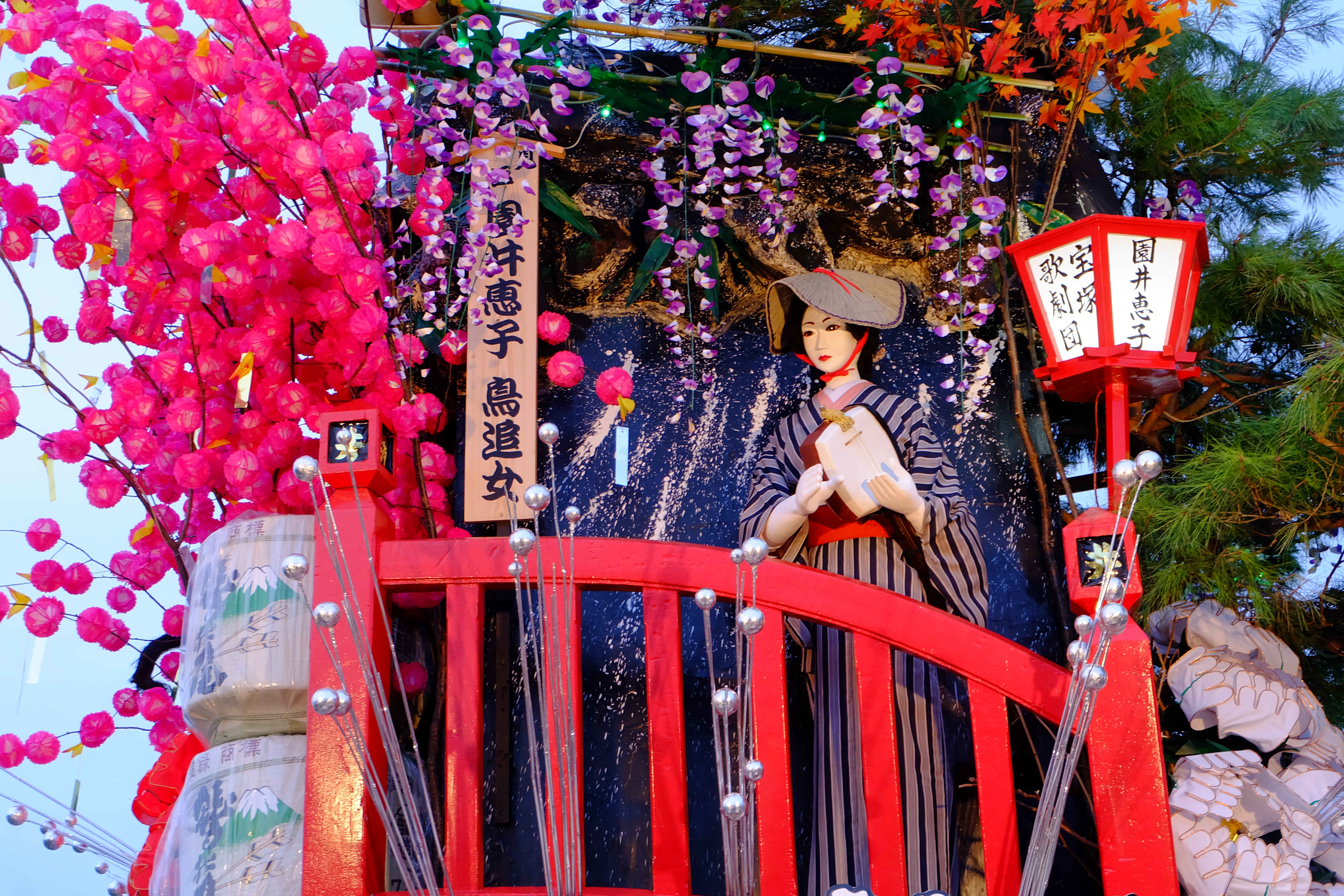 令和元年川口豊城稲荷神社例大祭の井組の山車で「園井恵子 鳥追い女」